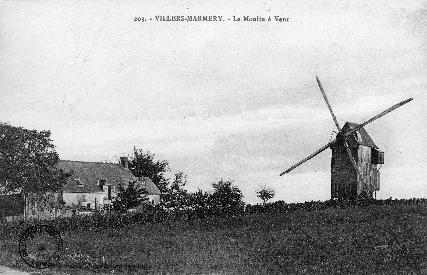 sur une vue ancienne.